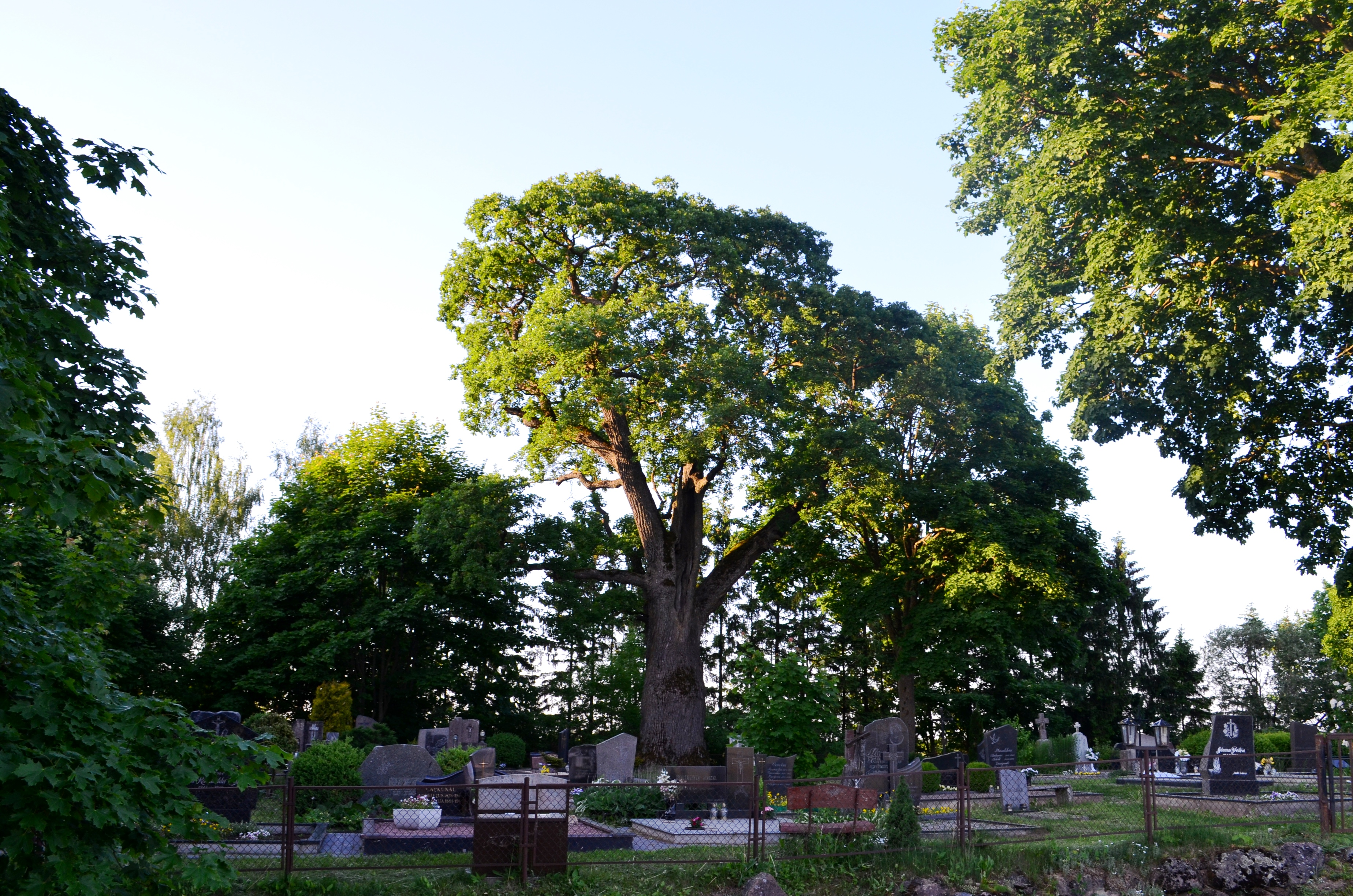 Grinių kapinių ąžuolas, Kėdainių raj.